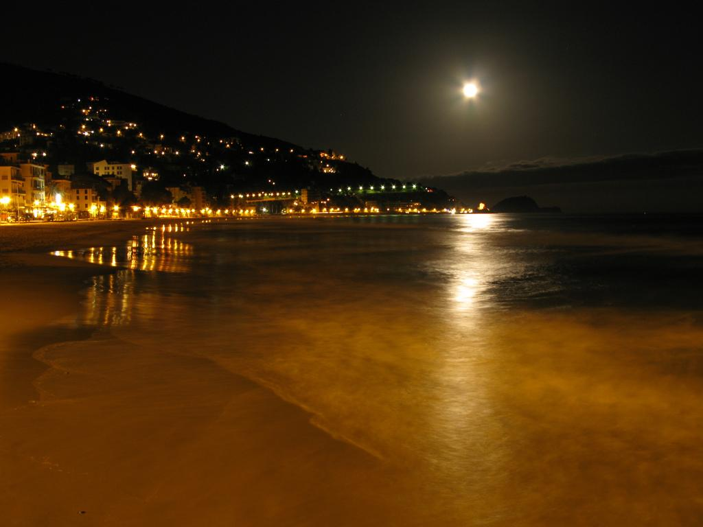 Spiaggia di Alassio